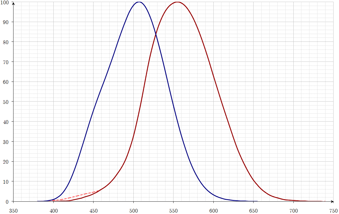 Efficacité lumineuse relative spectrale : scotopique en bleu (1951) photopique en rouge (1924) photopique correction (1988)